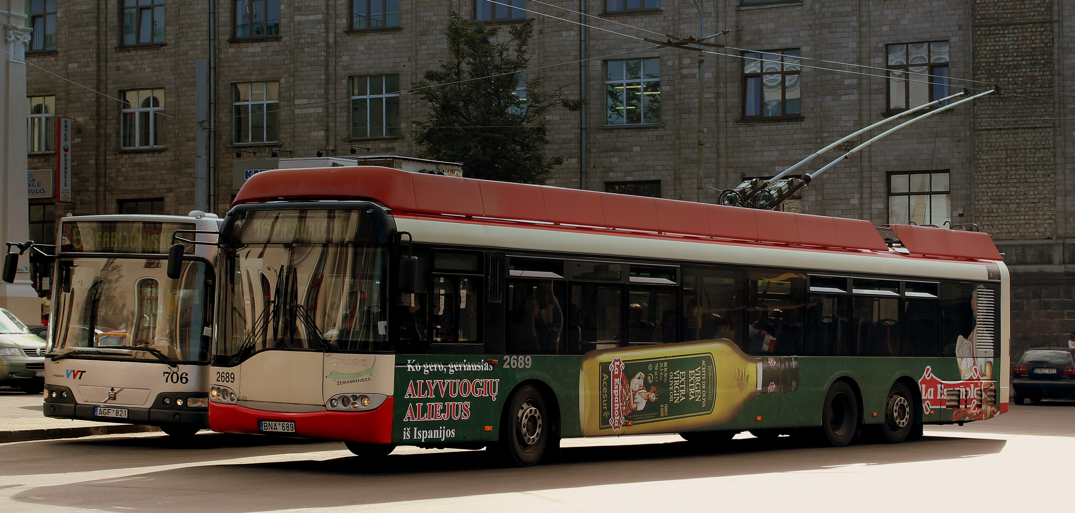 VILLUNUS TROLLEY BUS LITHUANIA SEP 2013